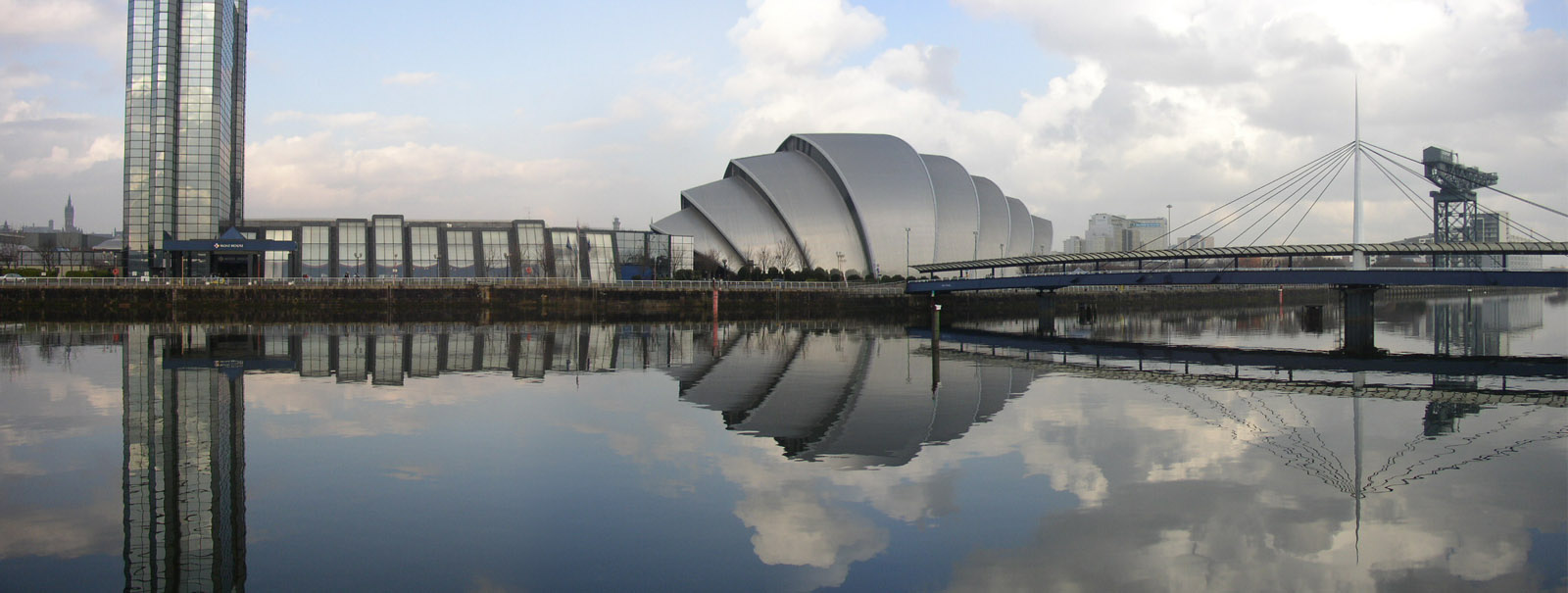 El SECC en Glasgow.